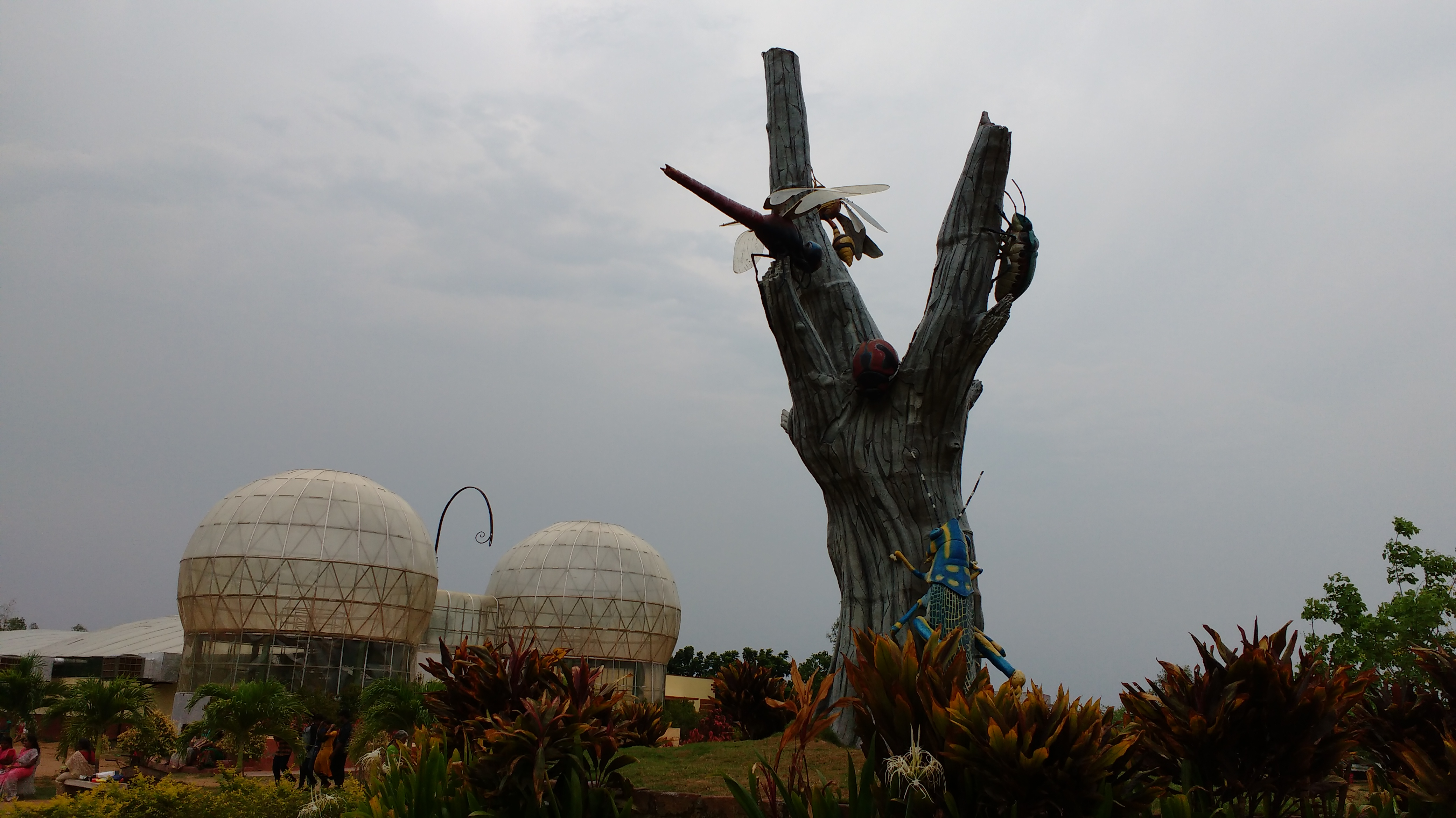 ஸ்ரீரங்கம் வண்ணத்துப்பூச்சி பூங்காவிலுள்ள செயற்கை கல்மரம்- பின்னணியில் இனக்பெருக்க மையம்